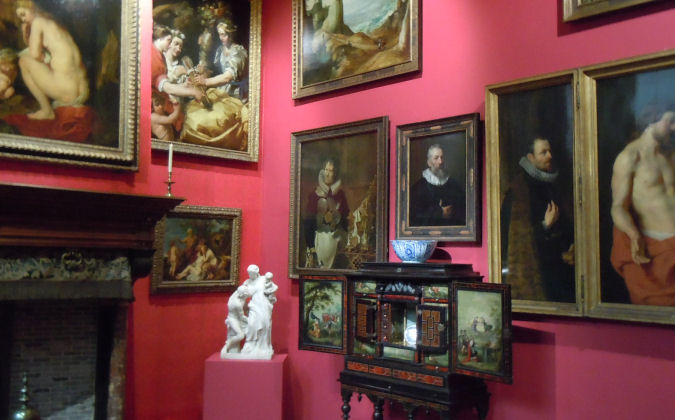 Rockox House, Antwerp